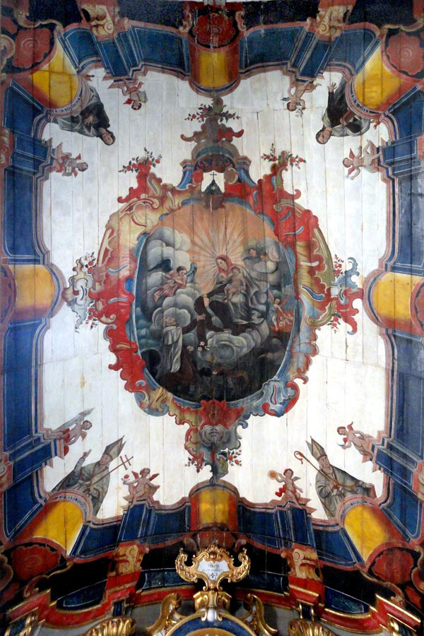 Igreja de Nossa Senhora do Carmo. Forro pintado por Joaquim Gonçalves da Rocha.